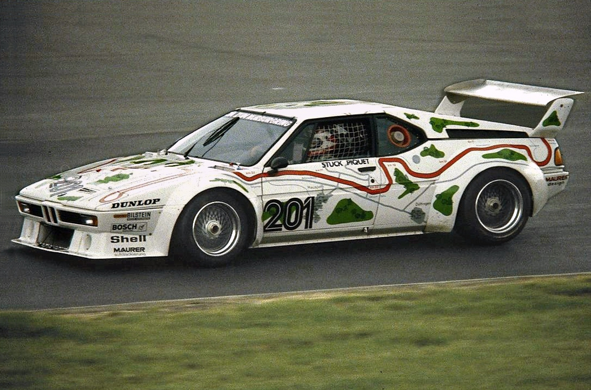 BMW M1 mit Nelson Piquet am Steuer 1980 beim Training zum 1000-km-Rennen auf dem Nürburgring